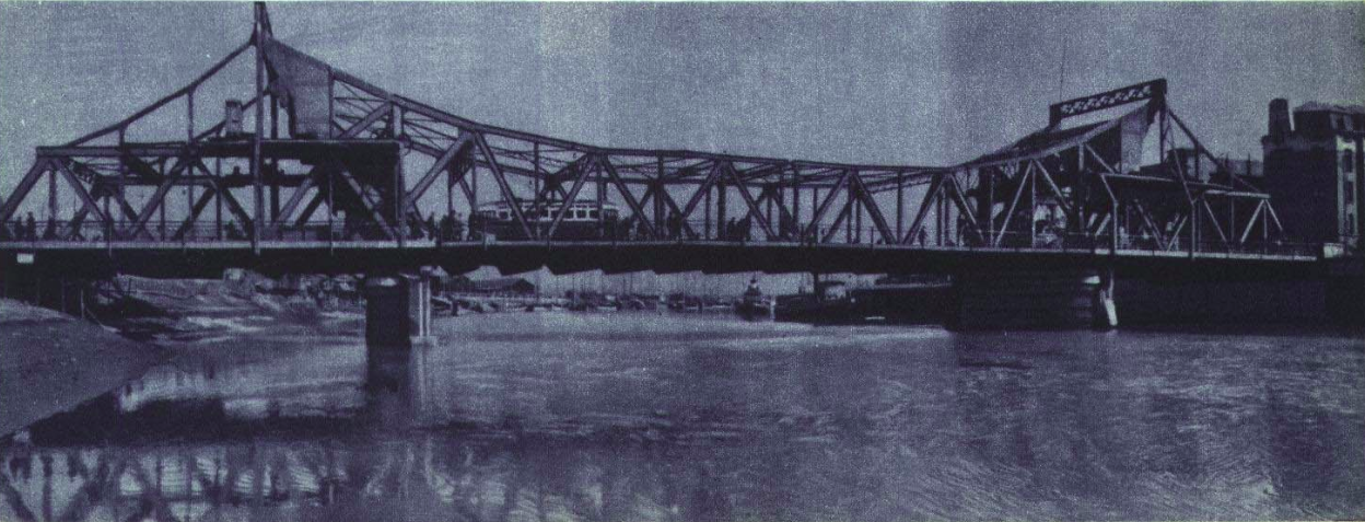 1952年天津解放桥